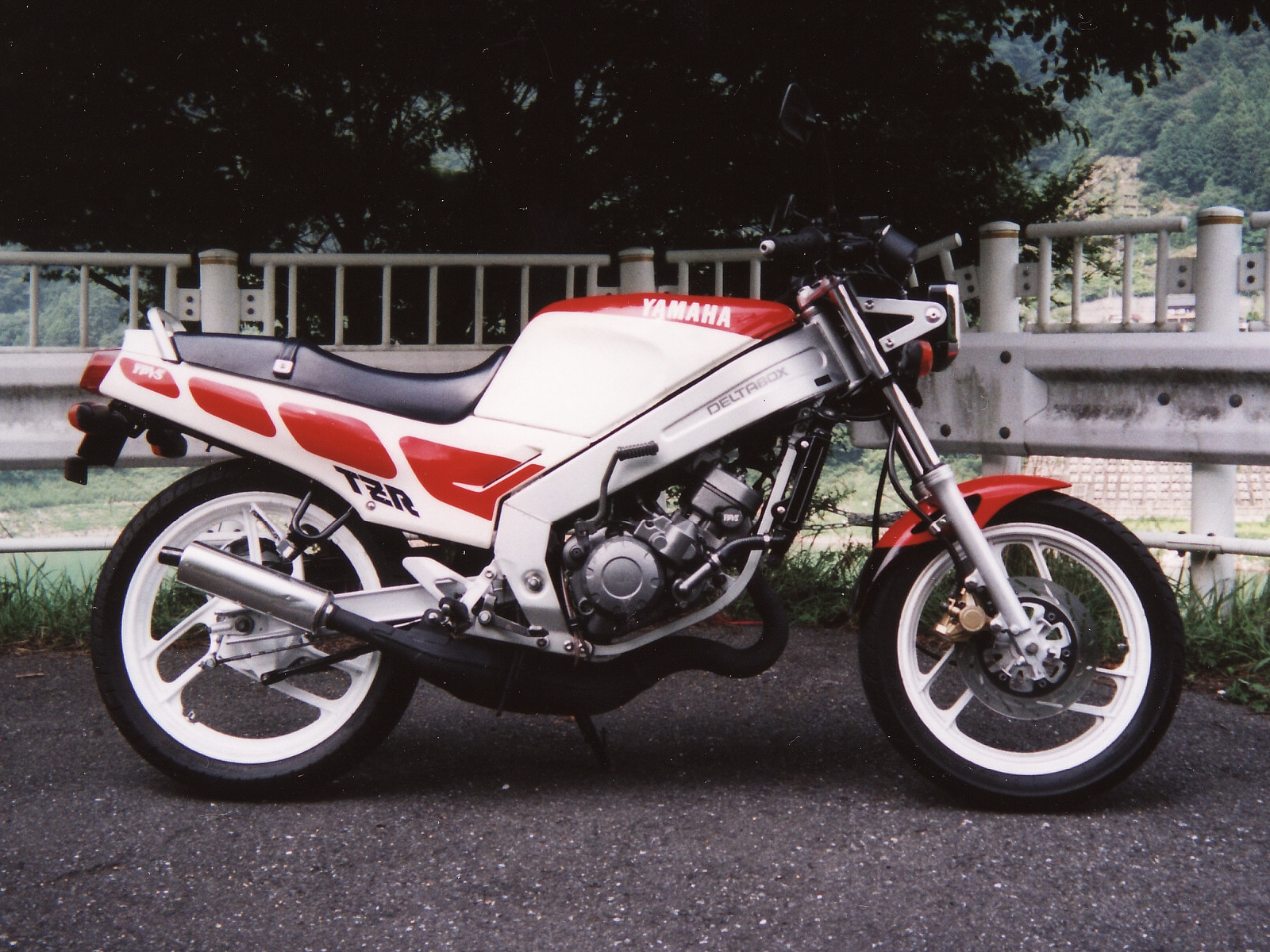 Yamaha TZR125(2RM) '1987 Japan